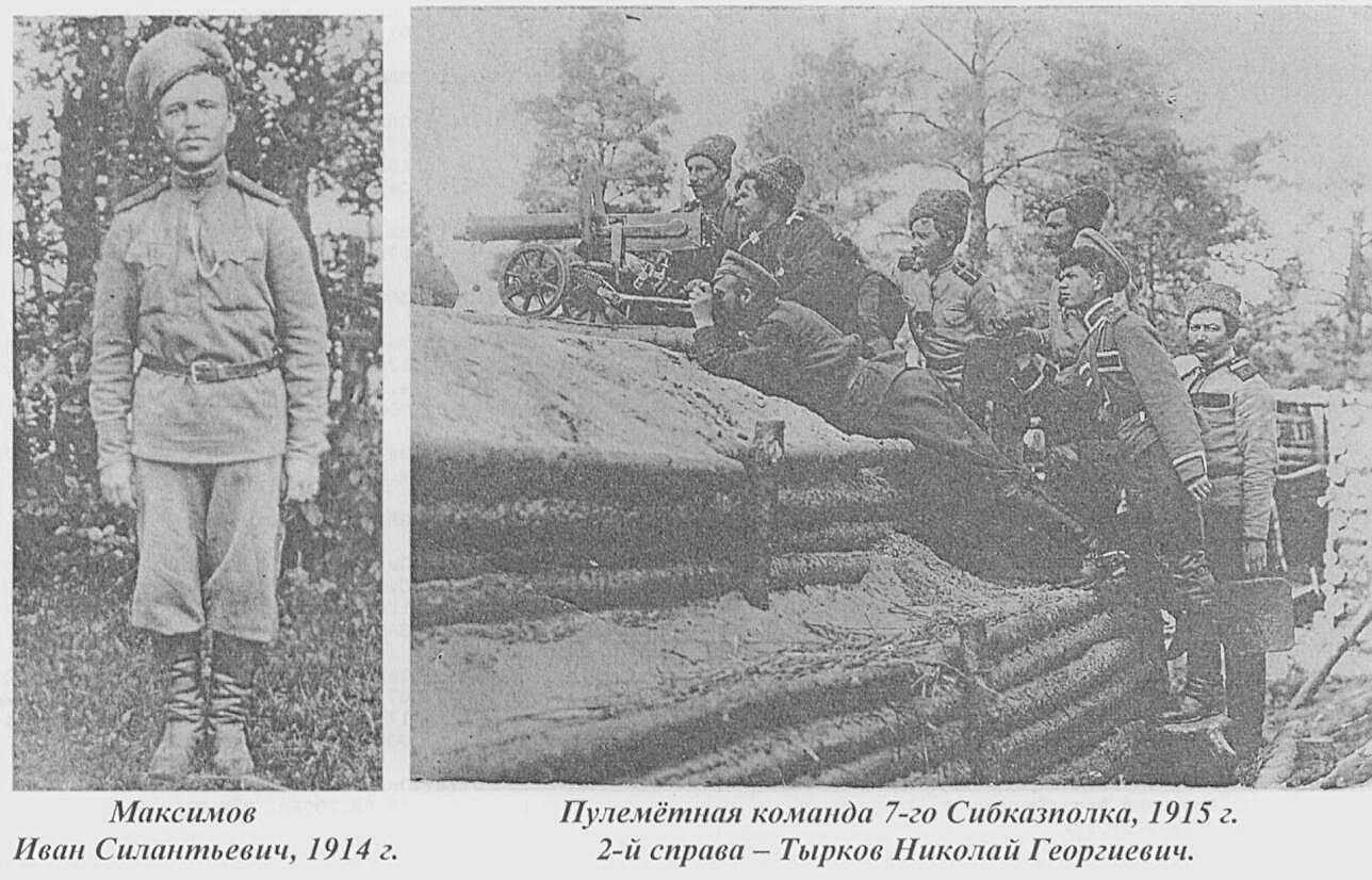 7-й Сибирский казачий полк